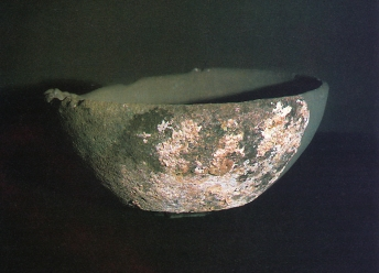 Baskoien katilua